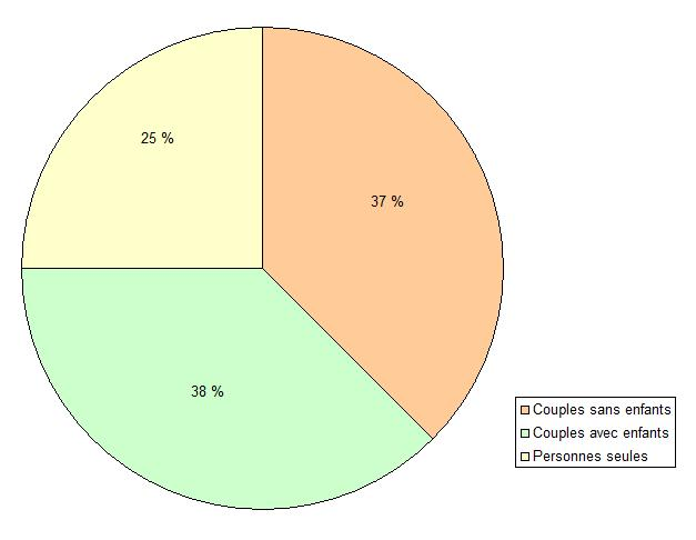 Composition des foyers, en 2007, à Sarton (Pas-de-Calais, France).